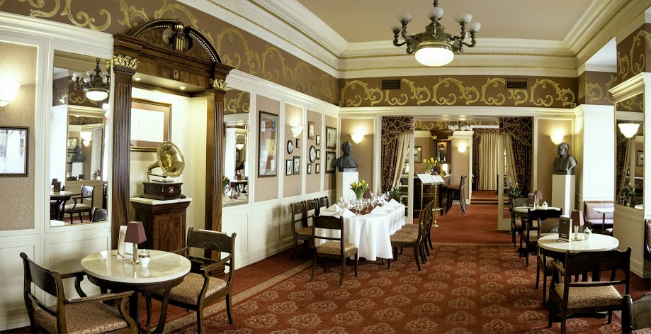 Restauracja Piano Grand Hotel Kraków